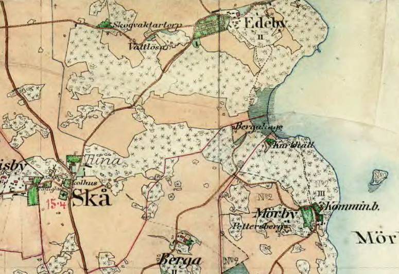 Skå och Edeby på häradsekonomiska kartan från 1901